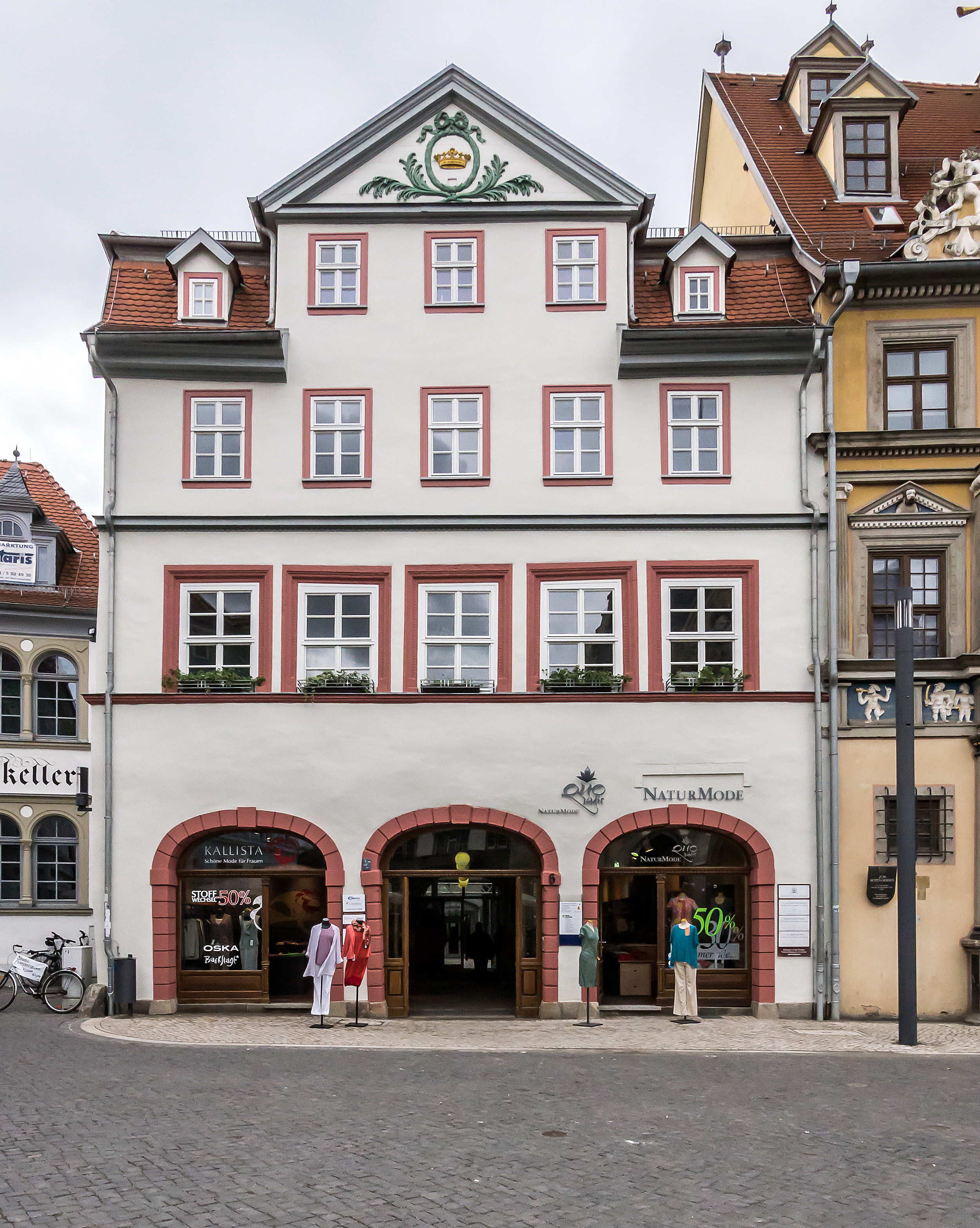 Erfurt-Altstadt Fischmarkt 6